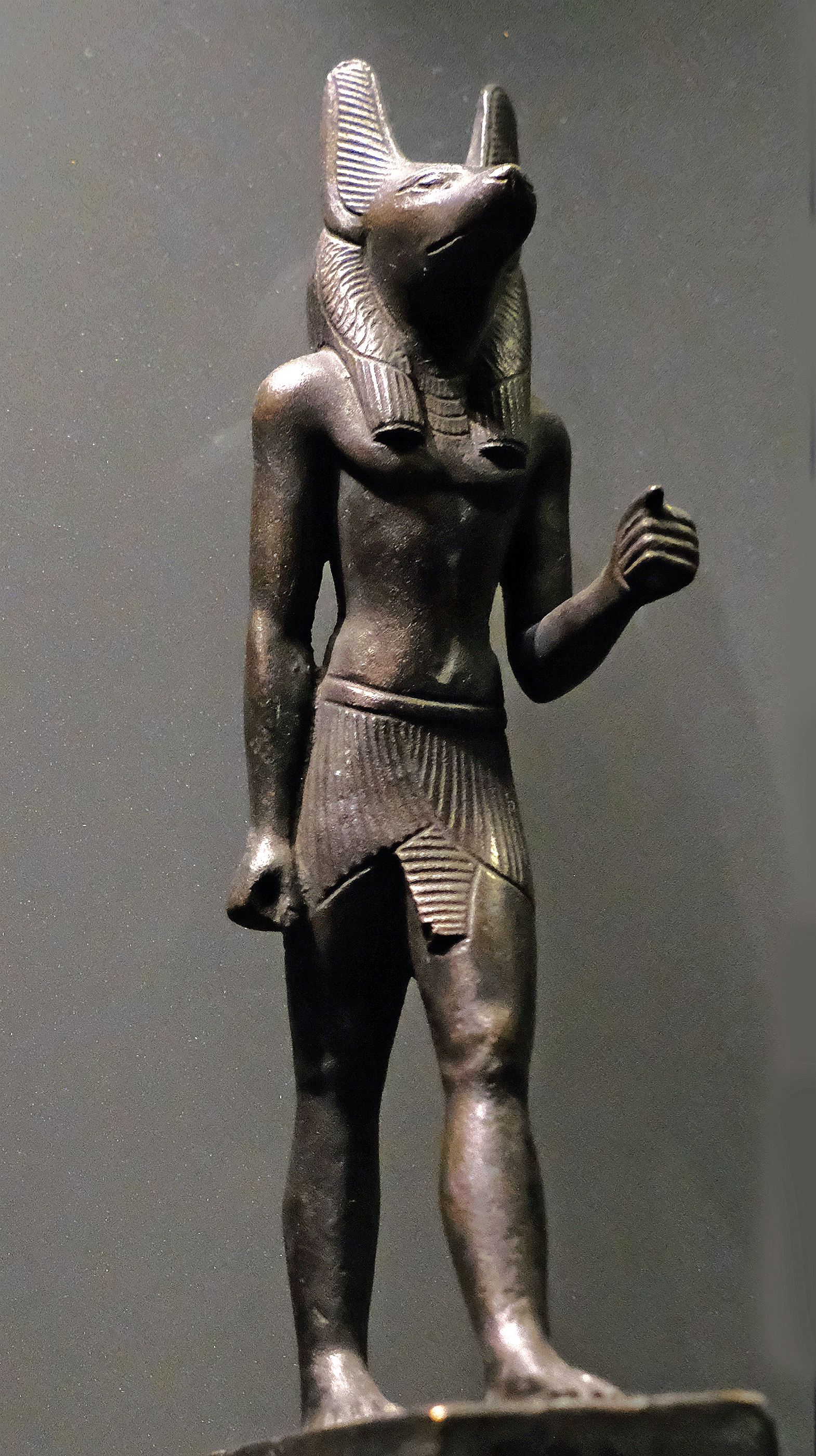 Statuette du dieu Anubis - Louvre